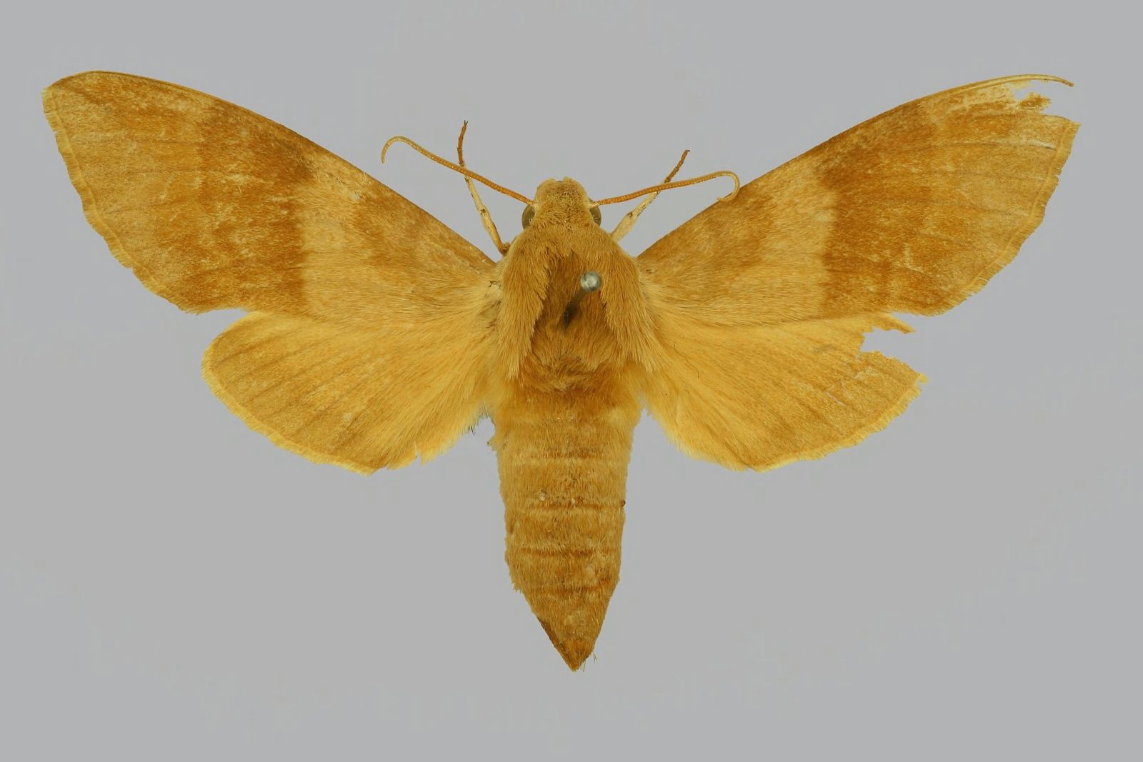 Clarina kotschyi, female, upperside. Iran, Shiraz